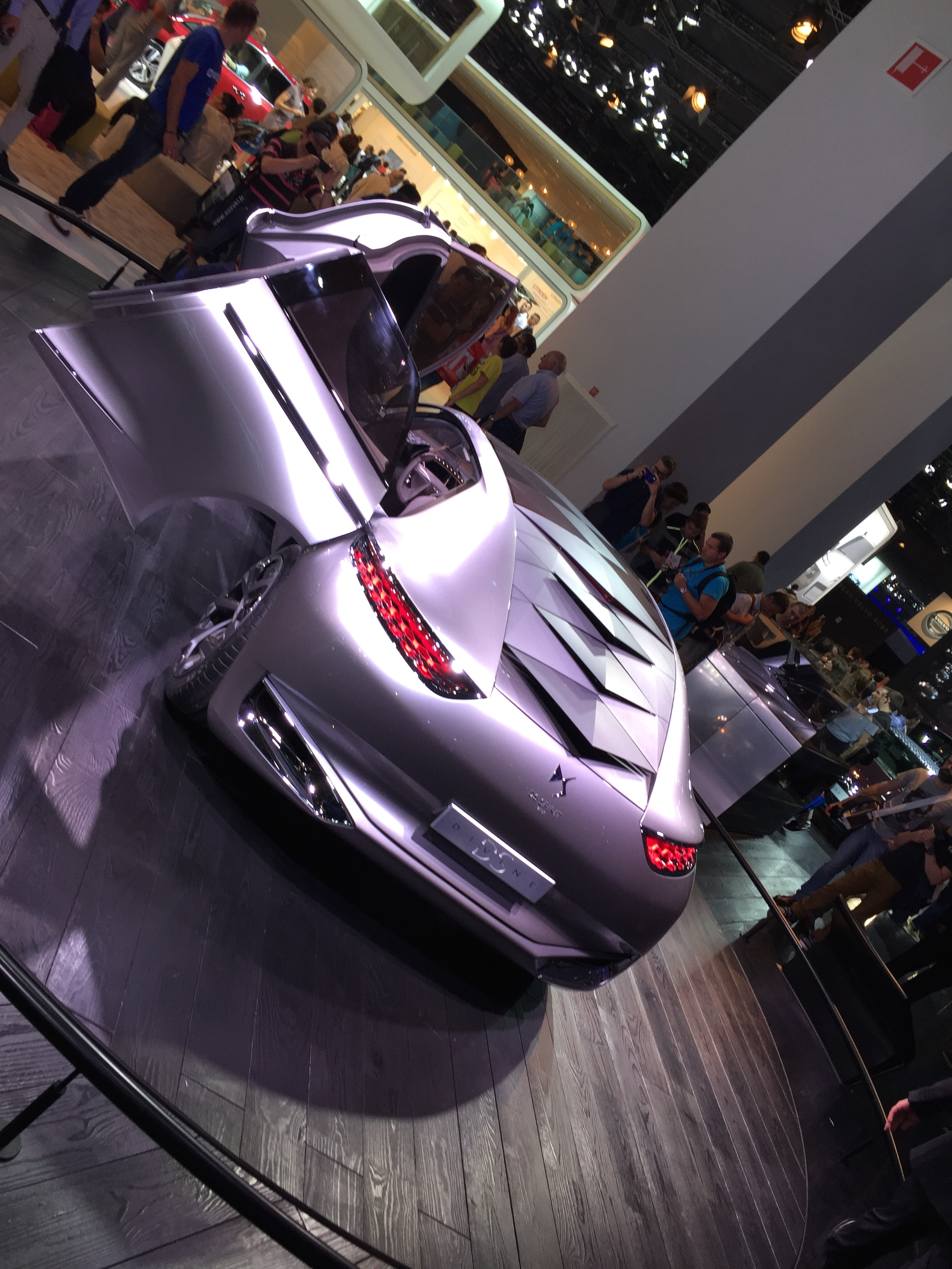 DS Divine concept au Mondial de l’Automobile de Paris 2014